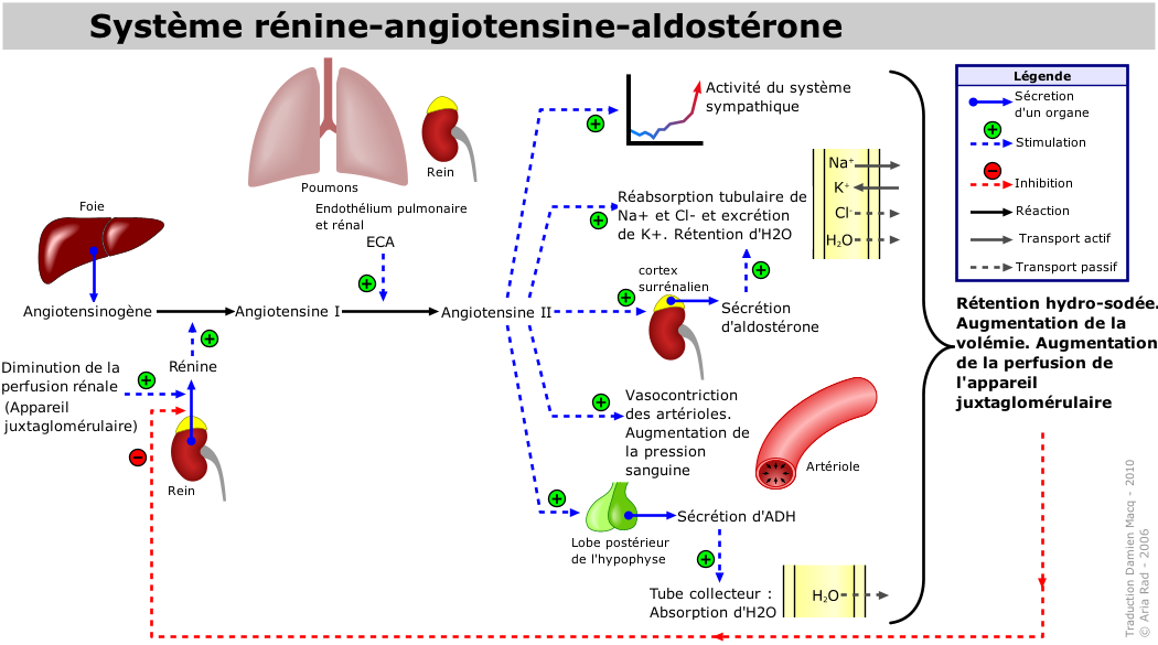 Le système rénine-angiotensine (SRA) ou le système rénine-angiotensine-aldostérone (SRAA). Commencer la lecture de ce schéma par la gauche, où il est écrit "Diminution de la perfusion rénale (appareil juxtaglomérulaire)". Le SRAA peut aussi être activé par une faible concentration de NaCl dans la macula densa ou par activation du système sympathique.